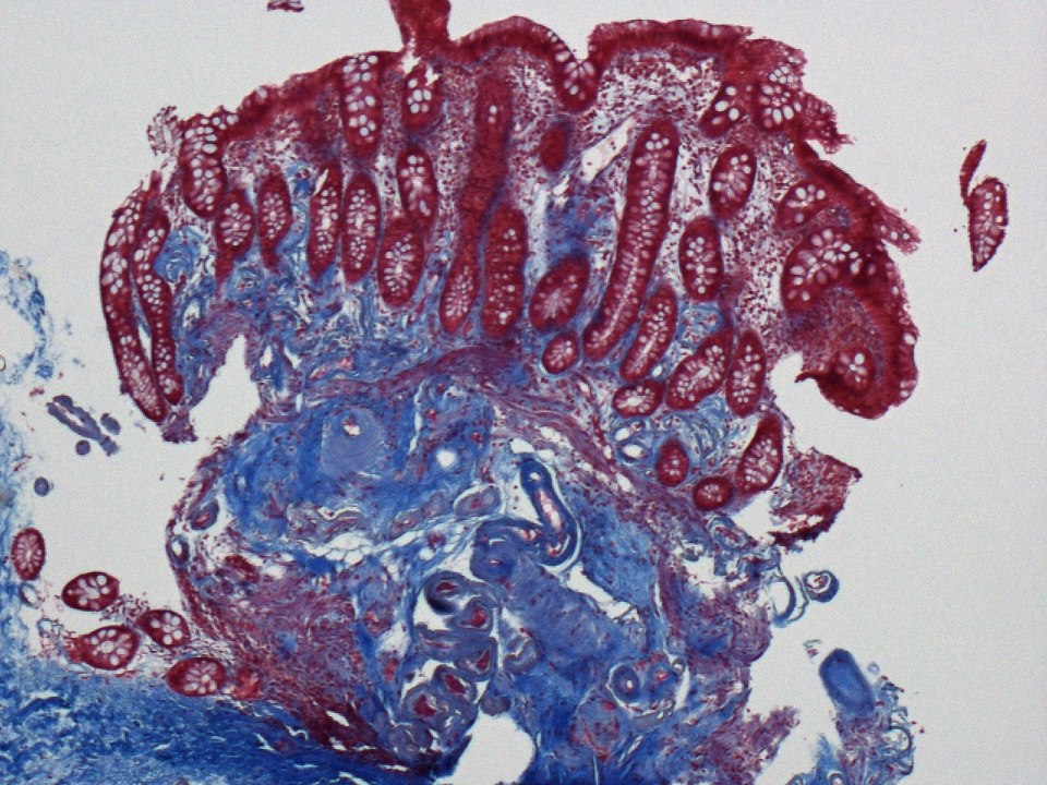 IMP